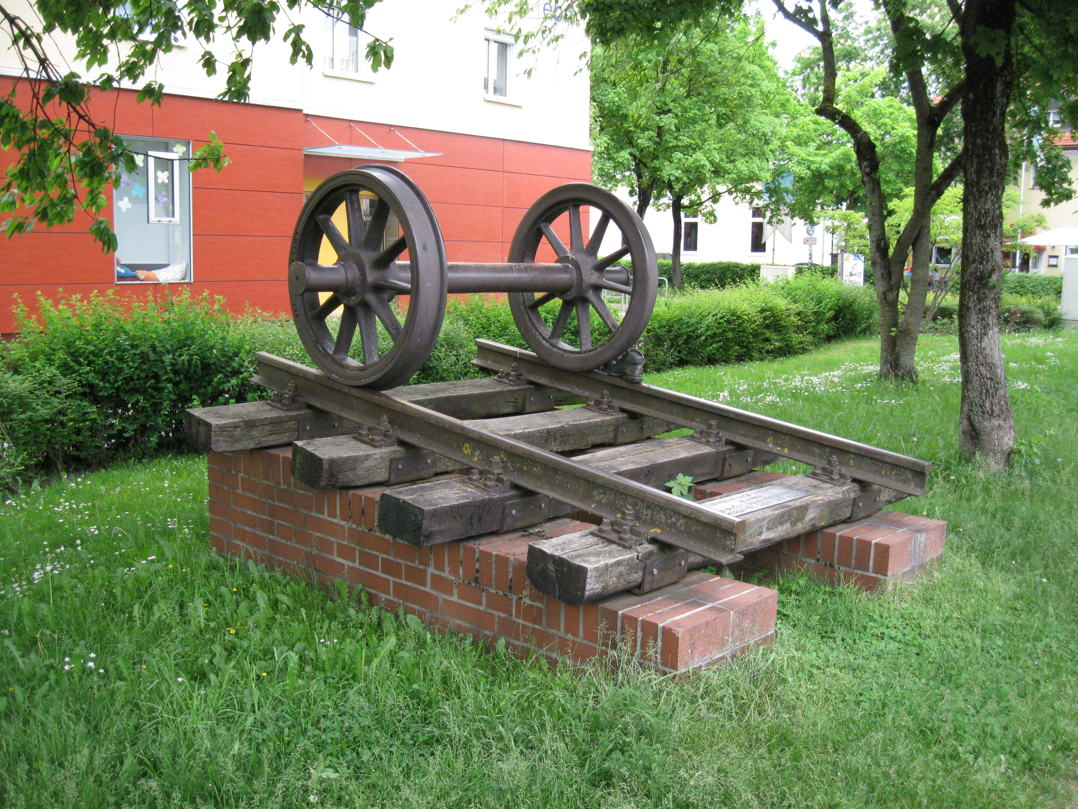 Neuaubing, Gedenkstein für die Errichtung als Eisenbahnersiedlung